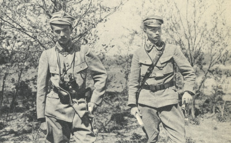 Dwóch legionistów: Podporucznik Zygmunt Żarski-Radoński (poległ) i podporucznik Stefan Pomarański.